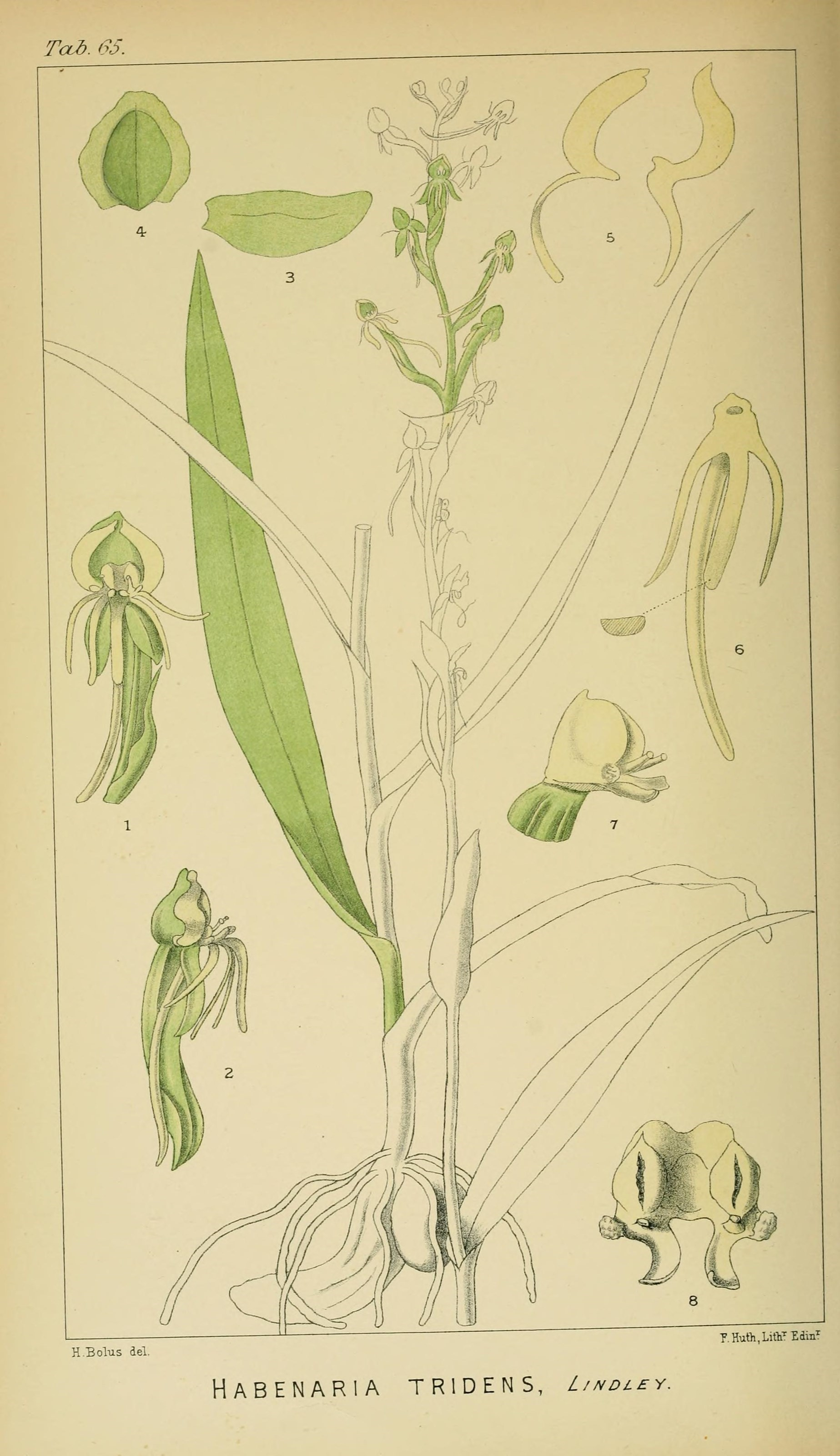 Ted). (^5. H, Bolus del. T,Hutli,LitliEdin^ HABENARIA TR1DEN5, L/ndlev.